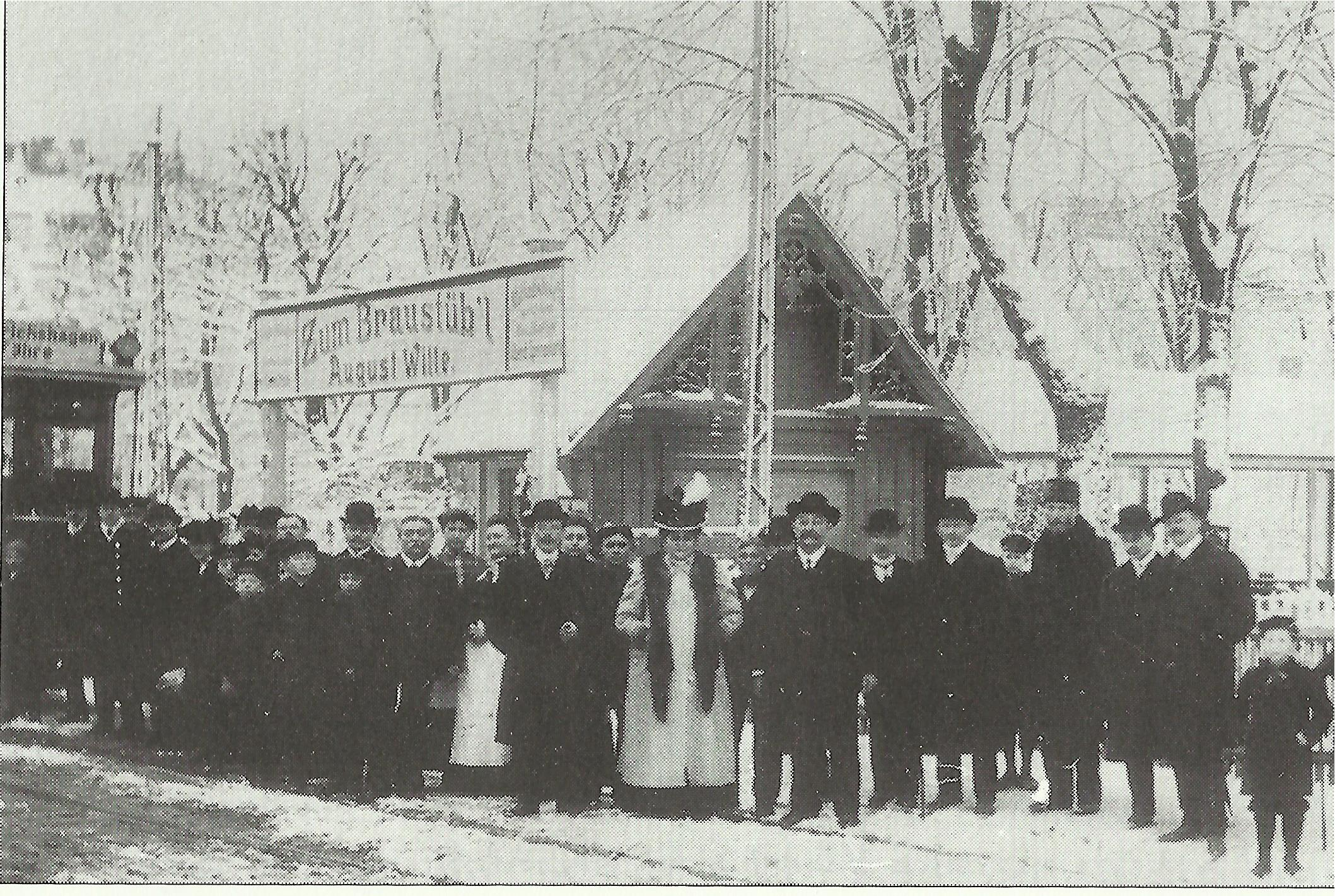 Eröffnung der Linie 5 der Städtischen Straßenbahn Cöpenick nach Friedrichshagen. Die Gäste haben sich vor der Brauerei in Friedrichshagen versammelt.